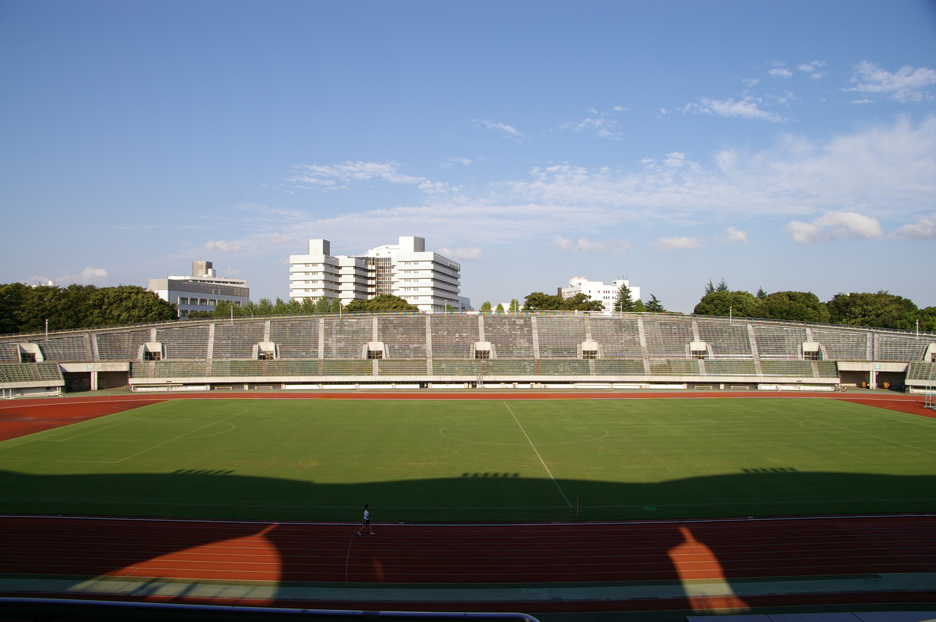 Metropolitan komazawa olynpic park 駒沢オリンピック公園総合運動場陸上競技場